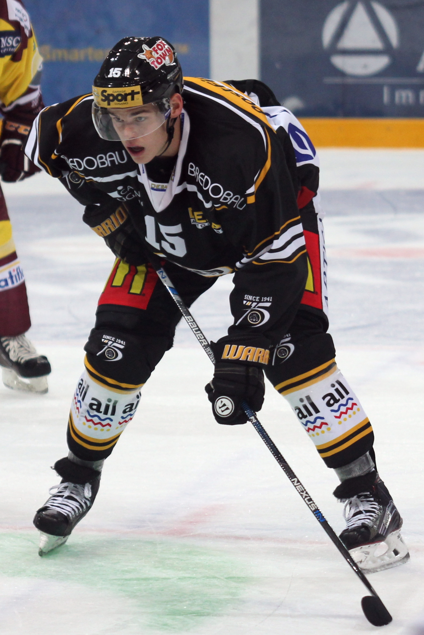 Gregory Hofmann (L 15).